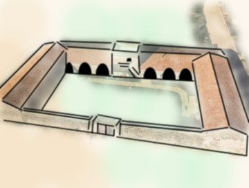 תרשים שיצרתי (במו ידיי...) עבור הערך he:תל חי